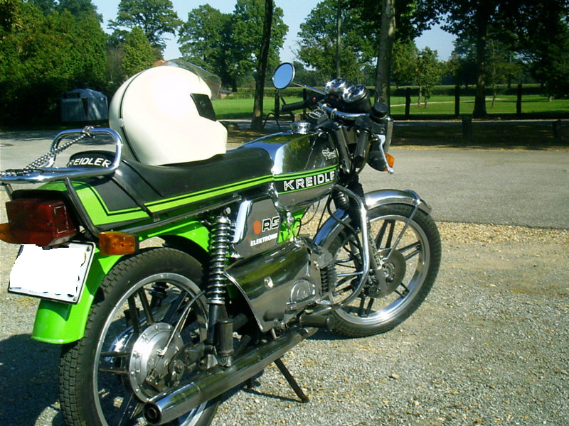 Kreidler Florett RS - GS (1977 Modell 78 ) ,Kleinkraftrad , 6,25 PS , 85 km/h